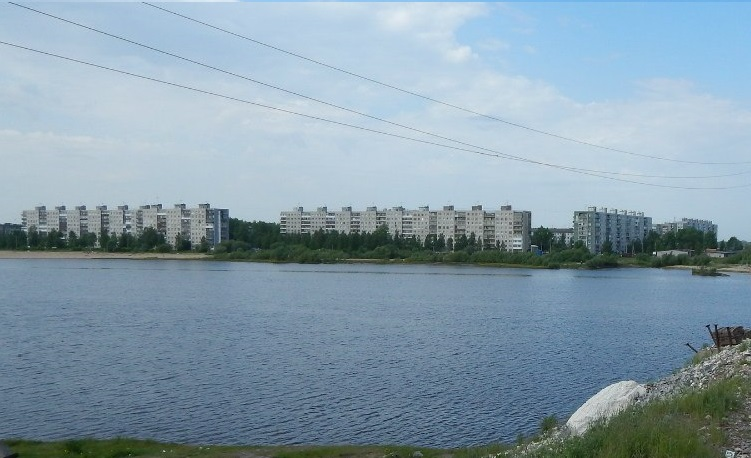 Вид на ул. 40-летия Великой Победы с противоположного берега реки Кузнечихи